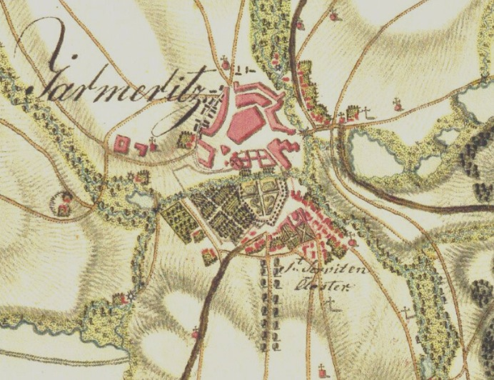 Mapa -Jaroměřice nad Rokytnou, I. vojenské mapování 1764-1768